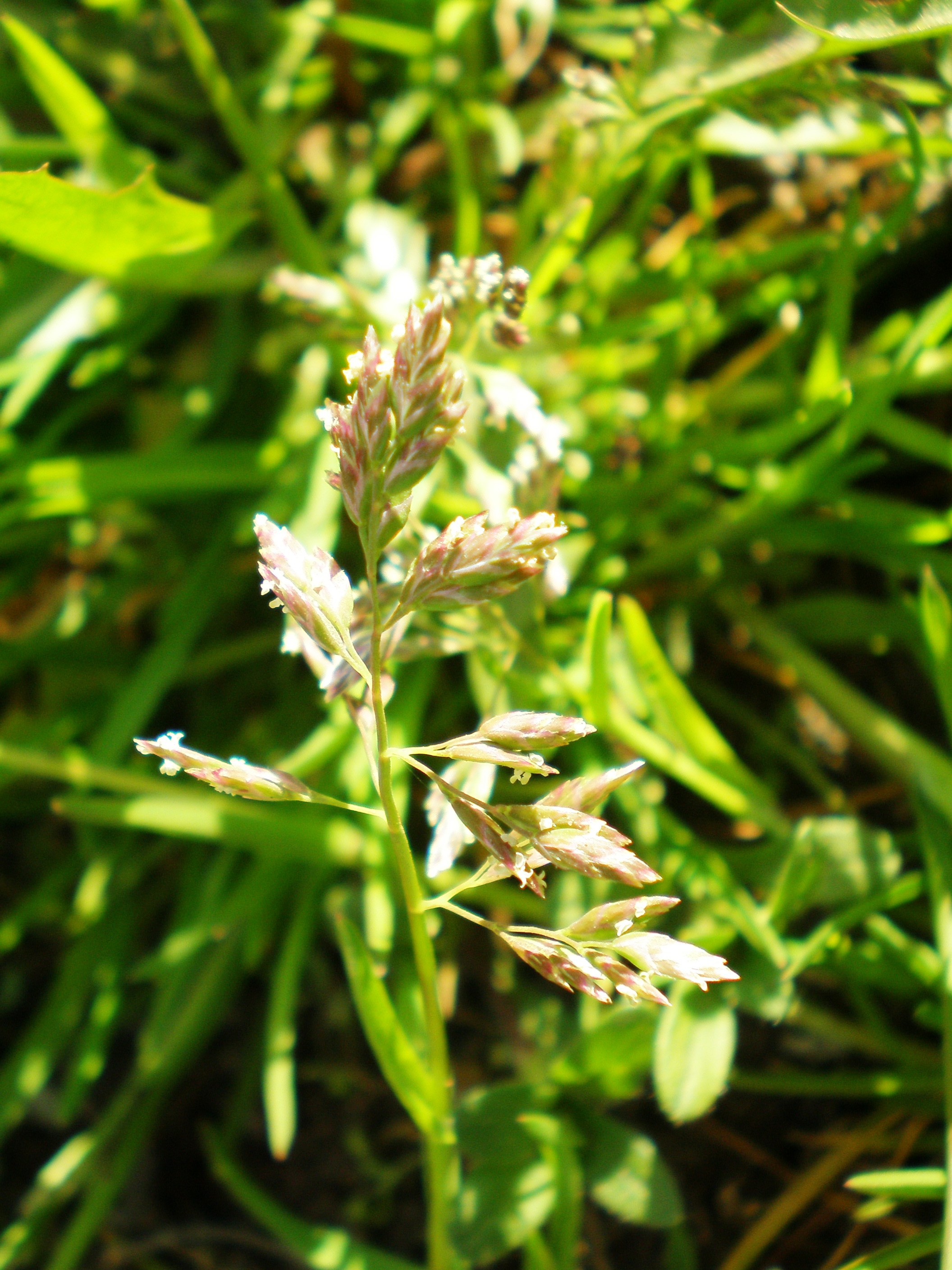 Vienametė miglė (Poa annua) Foto: Hugo.arg 2007.05.01